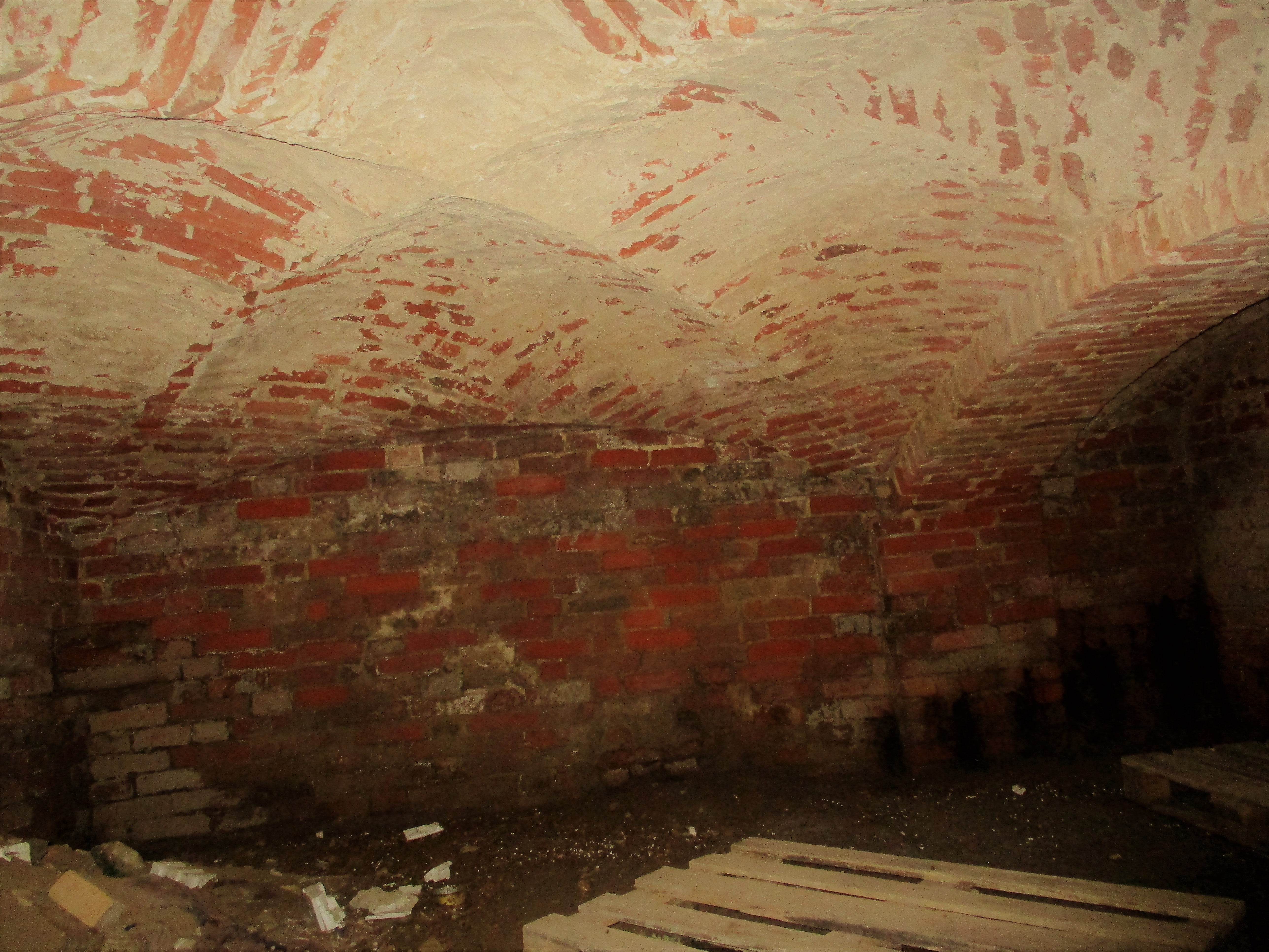 Vaade loodest mõisa peahoone kirdepoolse keldriruumi ristvõlvidele.